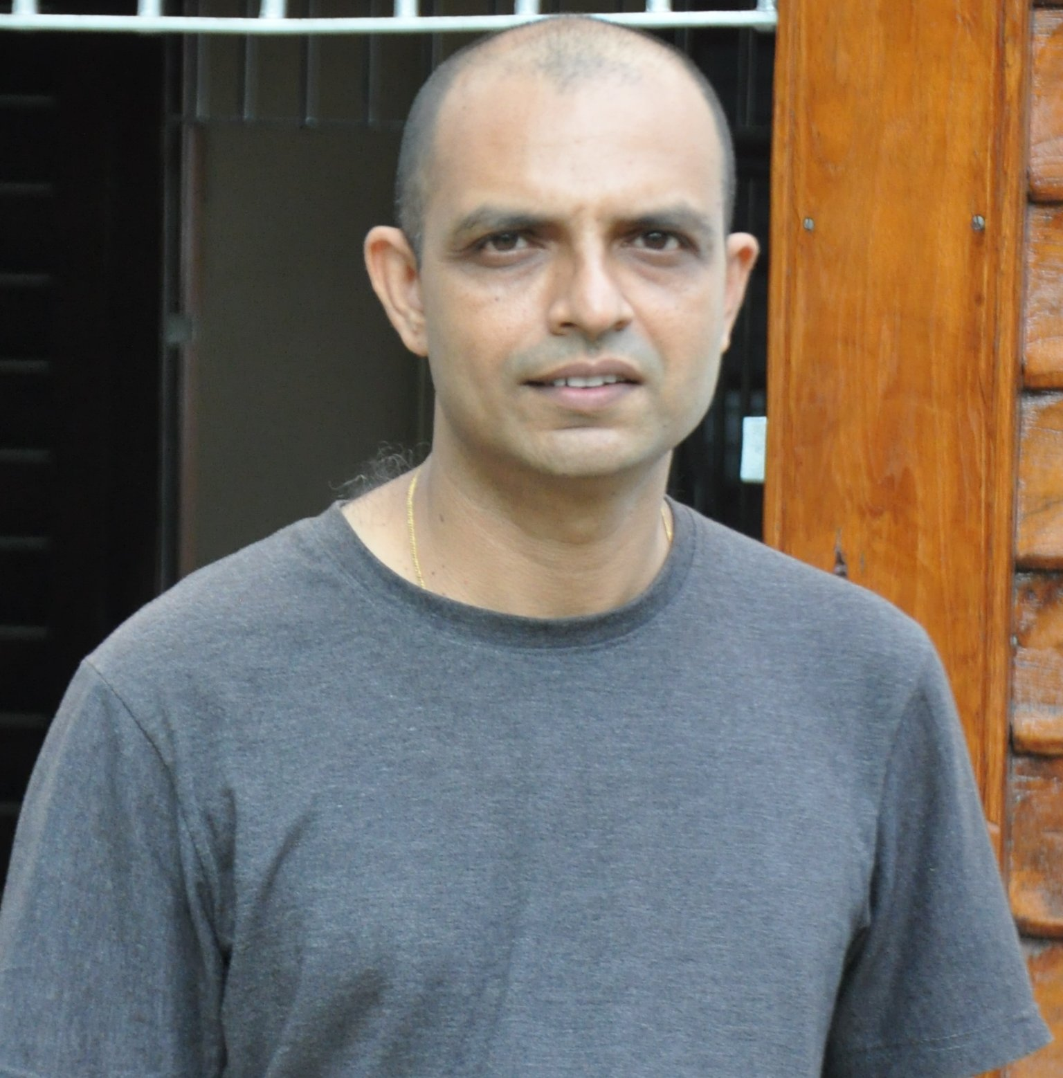 ജി.ആർ. ഇന്ദുഗോപൻ